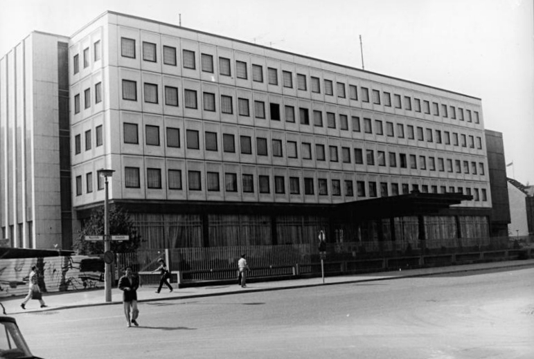 Berlin, Nordkoreanische Botschaft ADN-ZB Schneider 3.1.87-Qua-Berlin: Botschaft der Koreanischen Volksrepublik in der Glinkastraße 5-7.